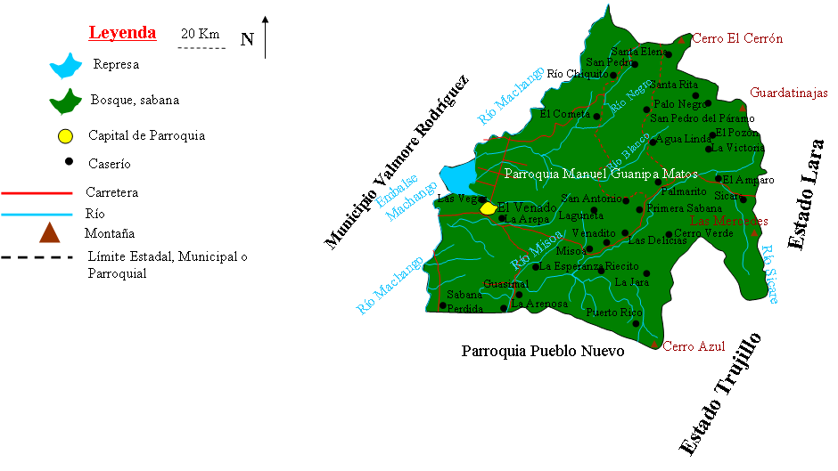 Mapa Parroquia Manuel Guanipa Matos, Municipio Baralt, Estado Zulia, Venezuela